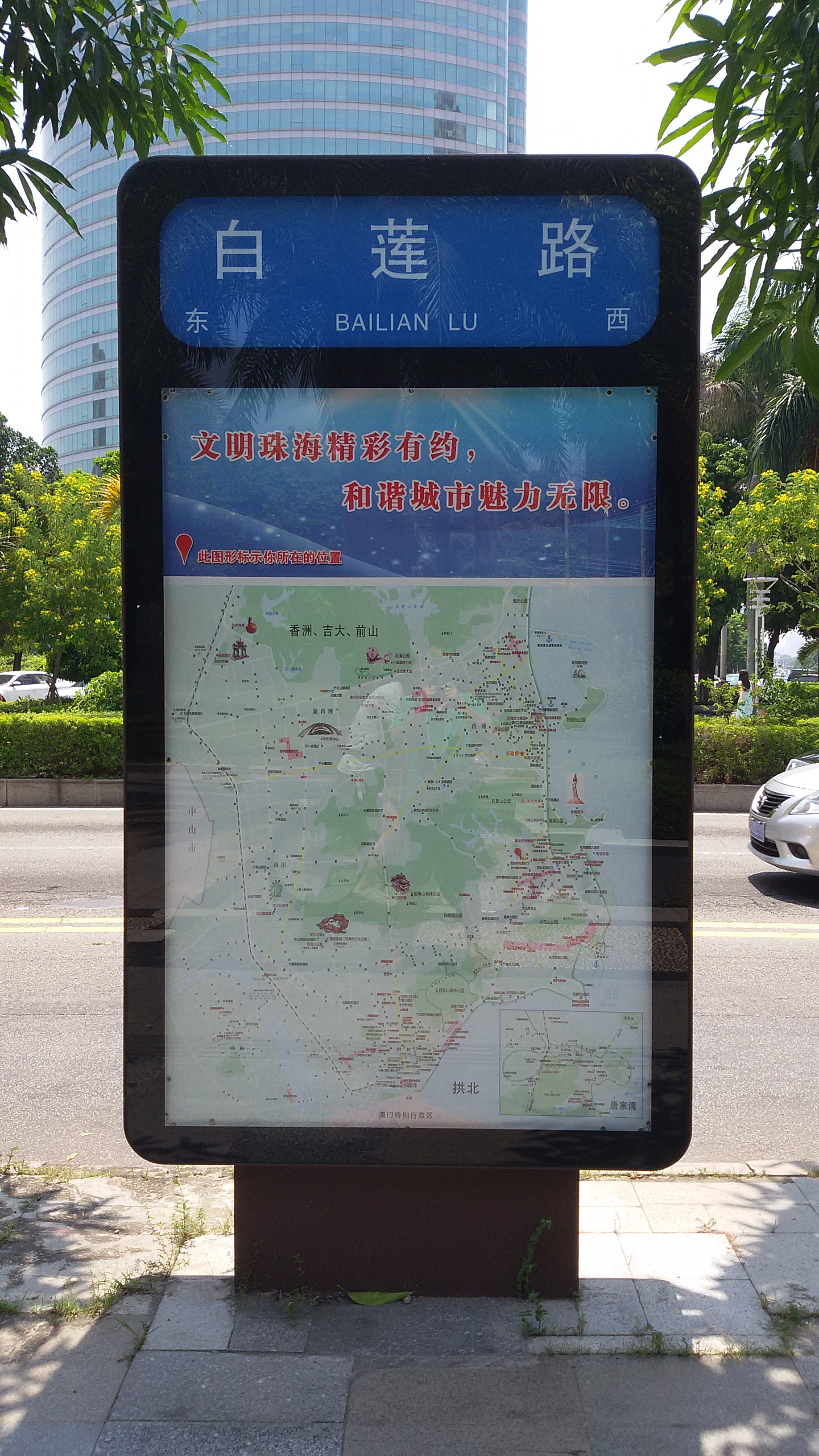 粵語: 白蓮路嘅路牌